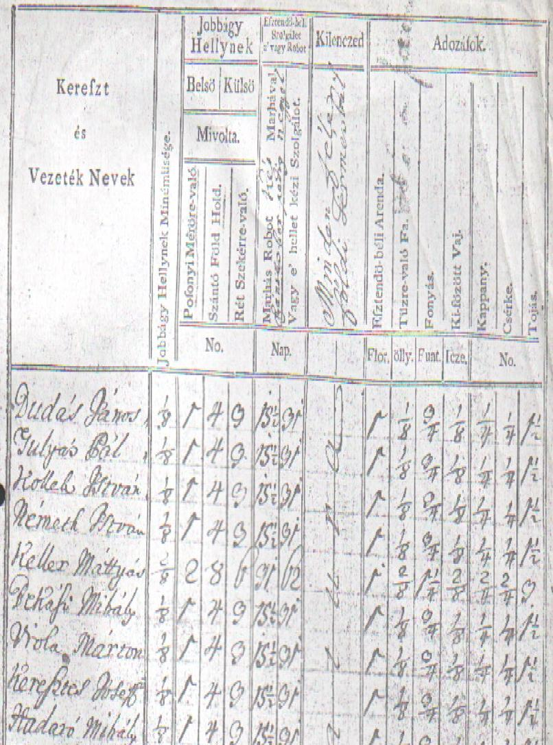 Bakonysárkány adófőkönyvének egyik lapja az 1880-as évekből